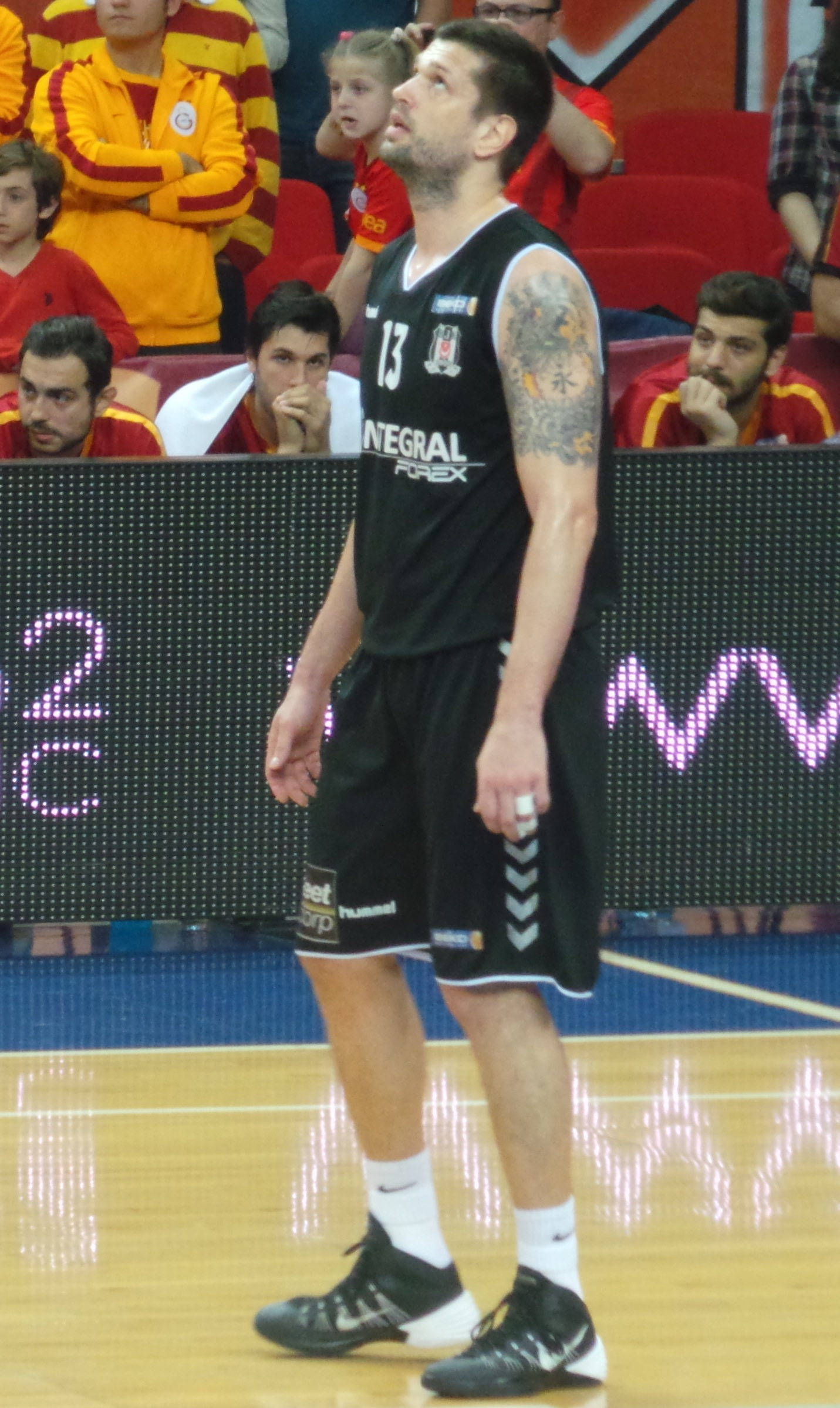 Tomislav Ruziç